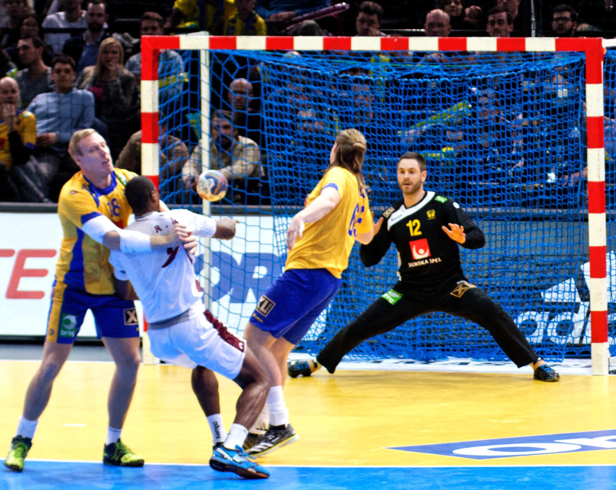 Match de la phase préliminaire du championnat du monde masculin de handball 2017 entre la Suède et le Qatar (Groupe D). A Bercy, le 18 janvier 2017.